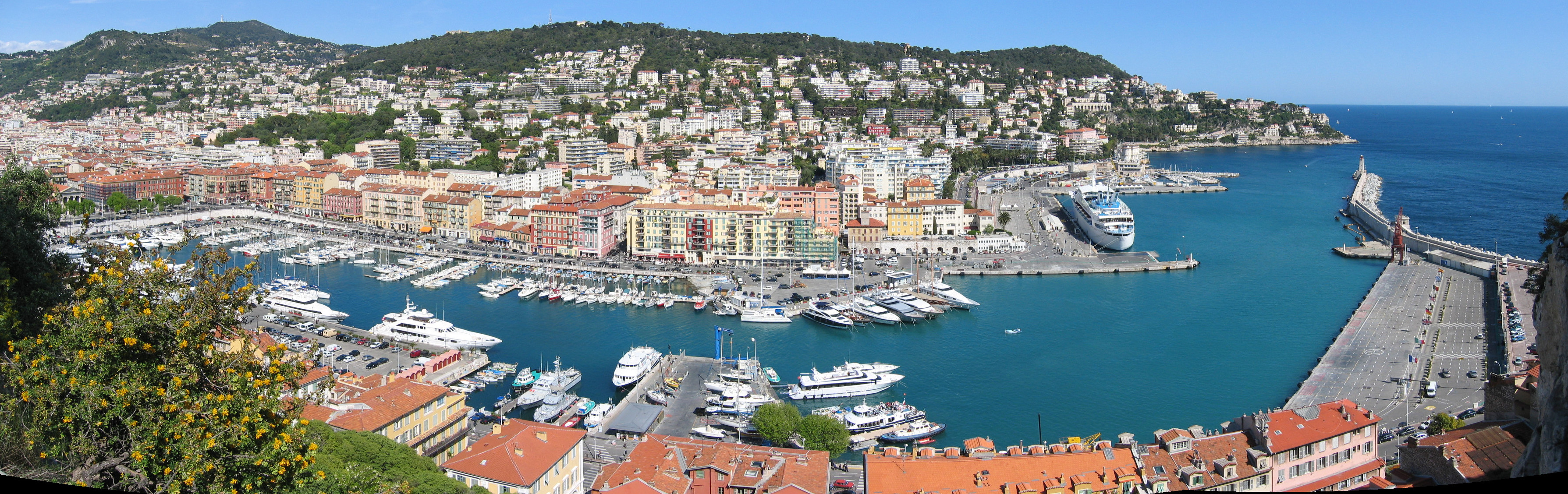 Vue panoramique sur le port Lympia et le Mont-Boron en 2008